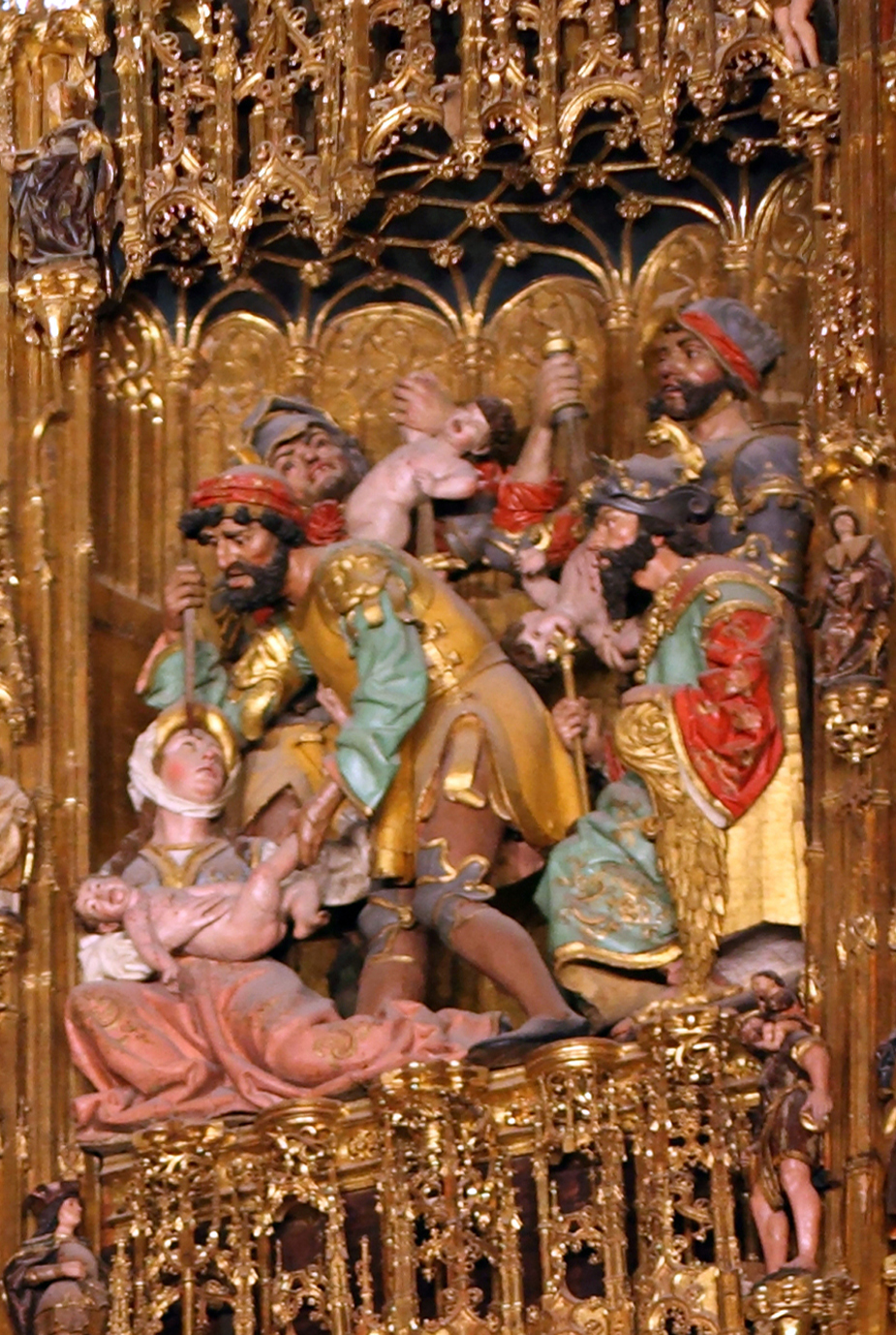 Matanza de los Inocentes, detalle del retablo mayor de la Catedral de Toledo (España)